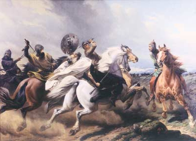 Niklot tod